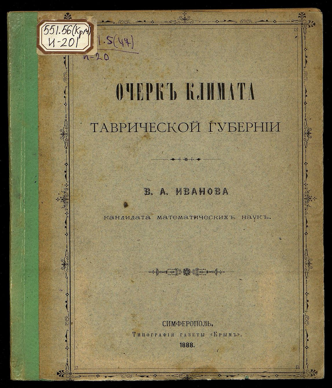 Иванов В. А. Очерк климата Таврической губернии. — Симферополь Типография газеты Крым, 1888